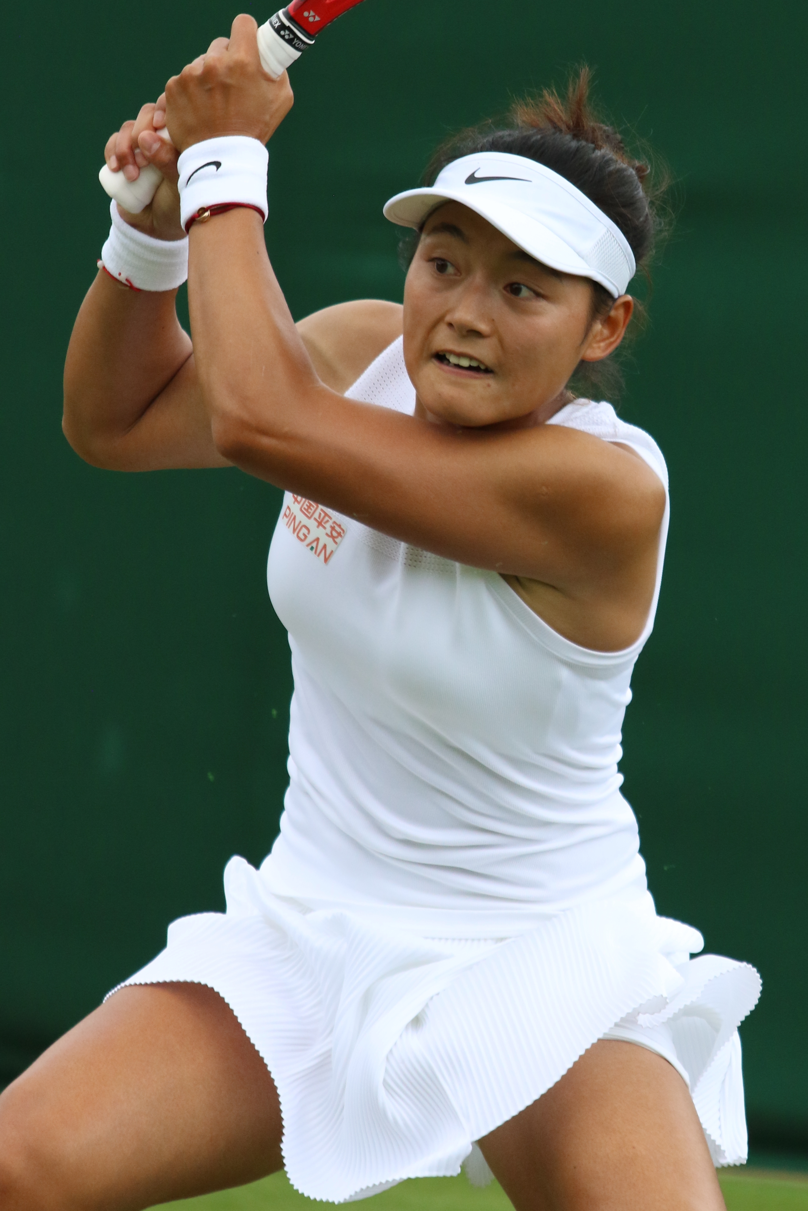 Wang Y. WM19 (36)